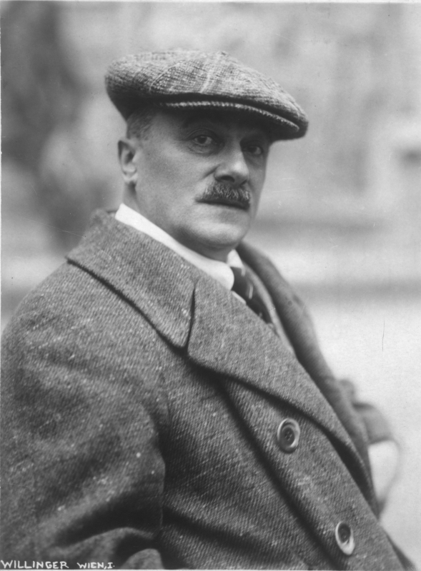 Porträt des Künstlers mit Sportkappe und Mantel.